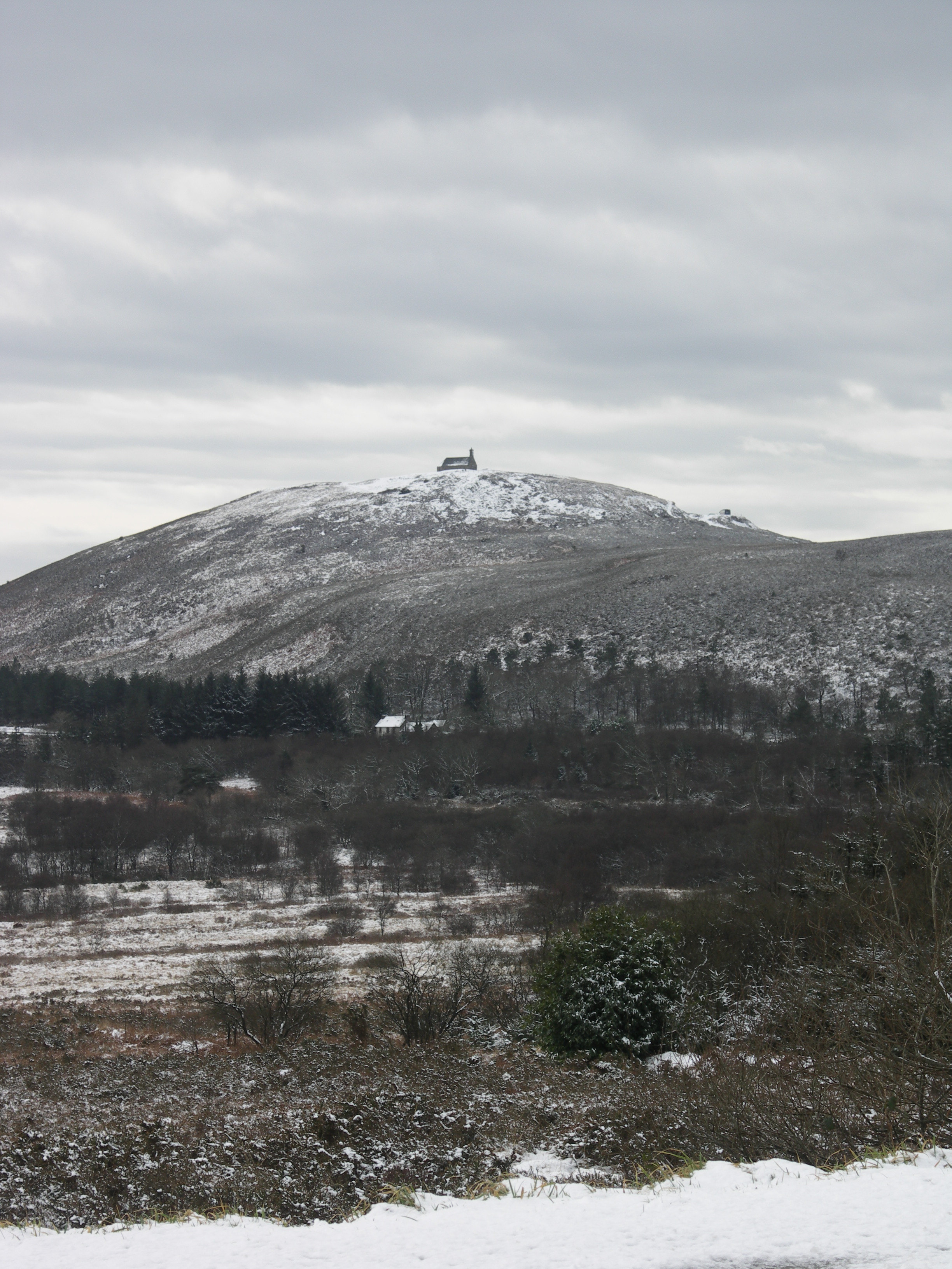 Le mont Saint-Michel sous la neige. Même si c'est assez rare et malgré la modestie de l'altitude (385 m) un "effet-montagne" net.